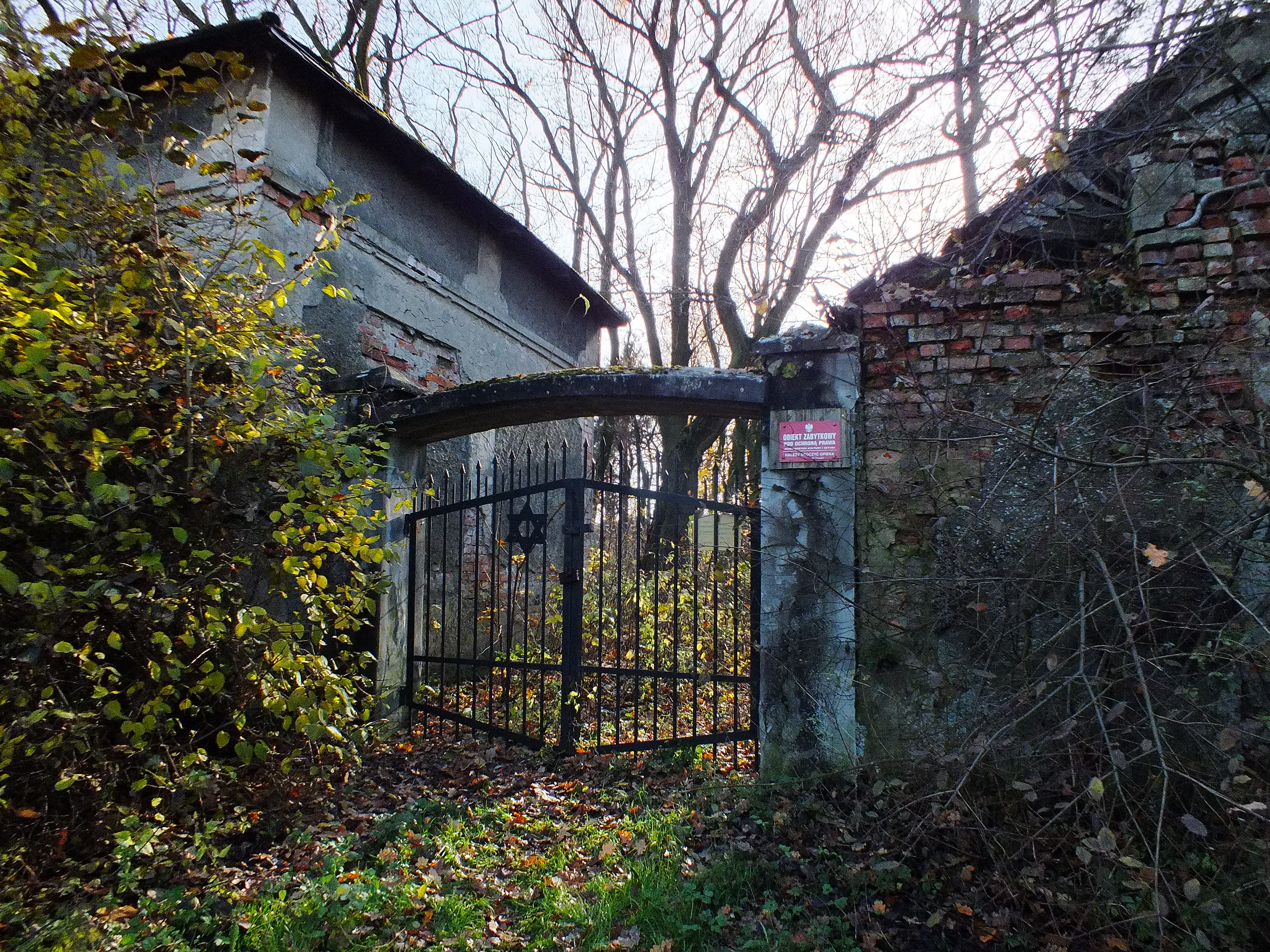 Zawiercie, cmentarz żydowski, XVIII, XIX